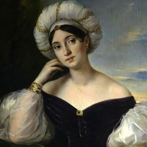 Agata Moncada di Paternò, Principessa di Satriano